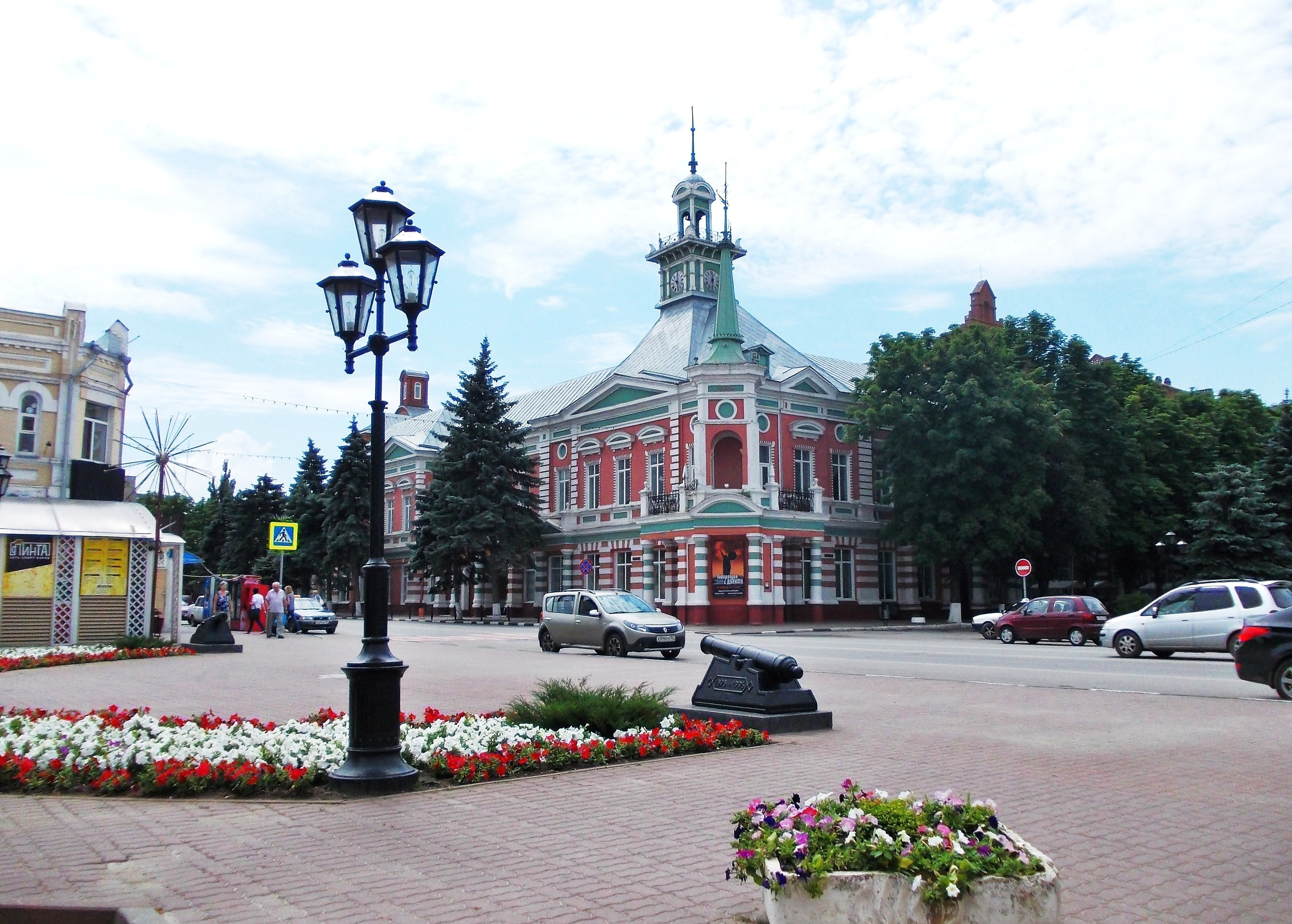 Здание второй городской Управы, Азов (Ростовская область)